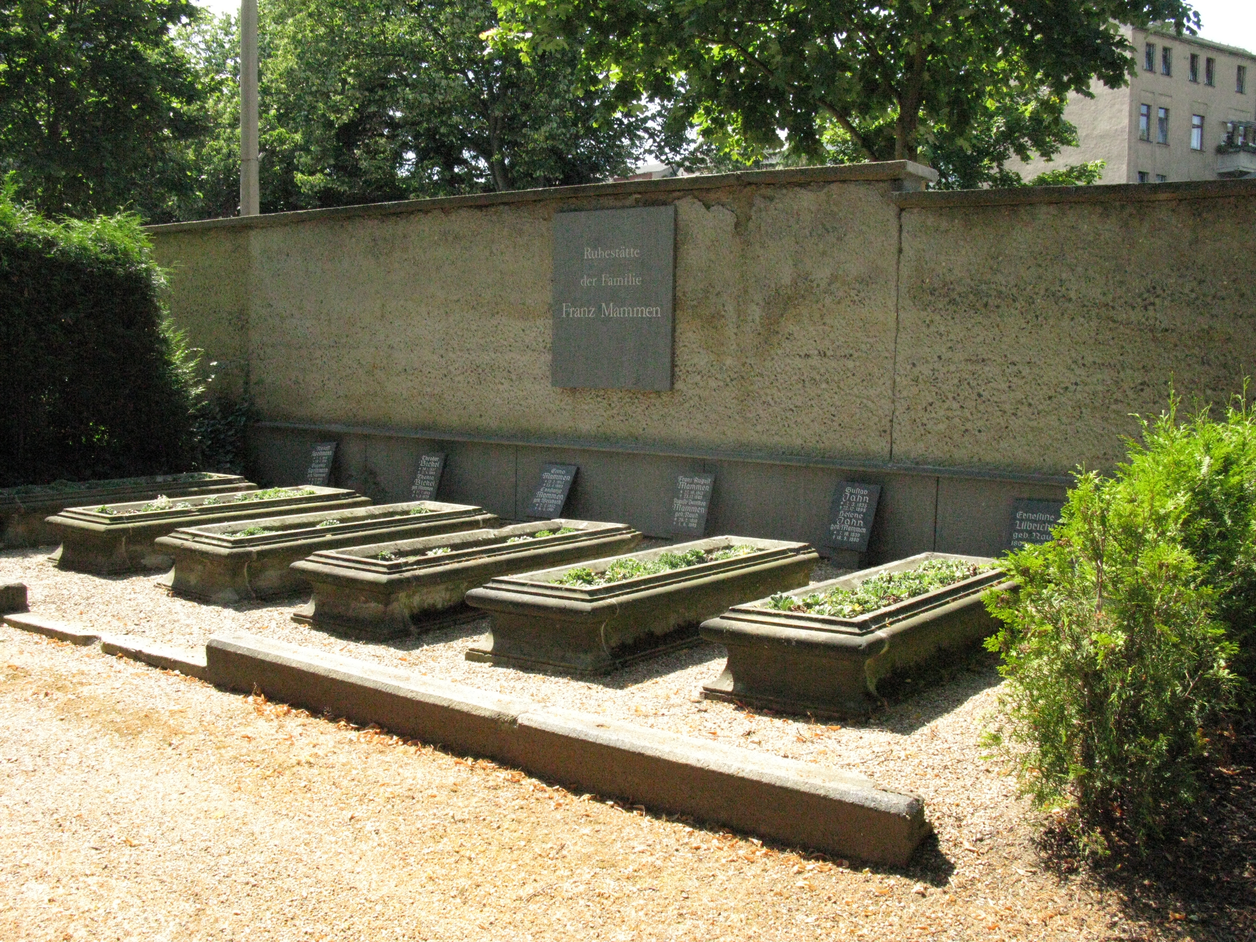 Plauen, Friedhof I - denkmalgeschütztes Grab von Familie Mammen